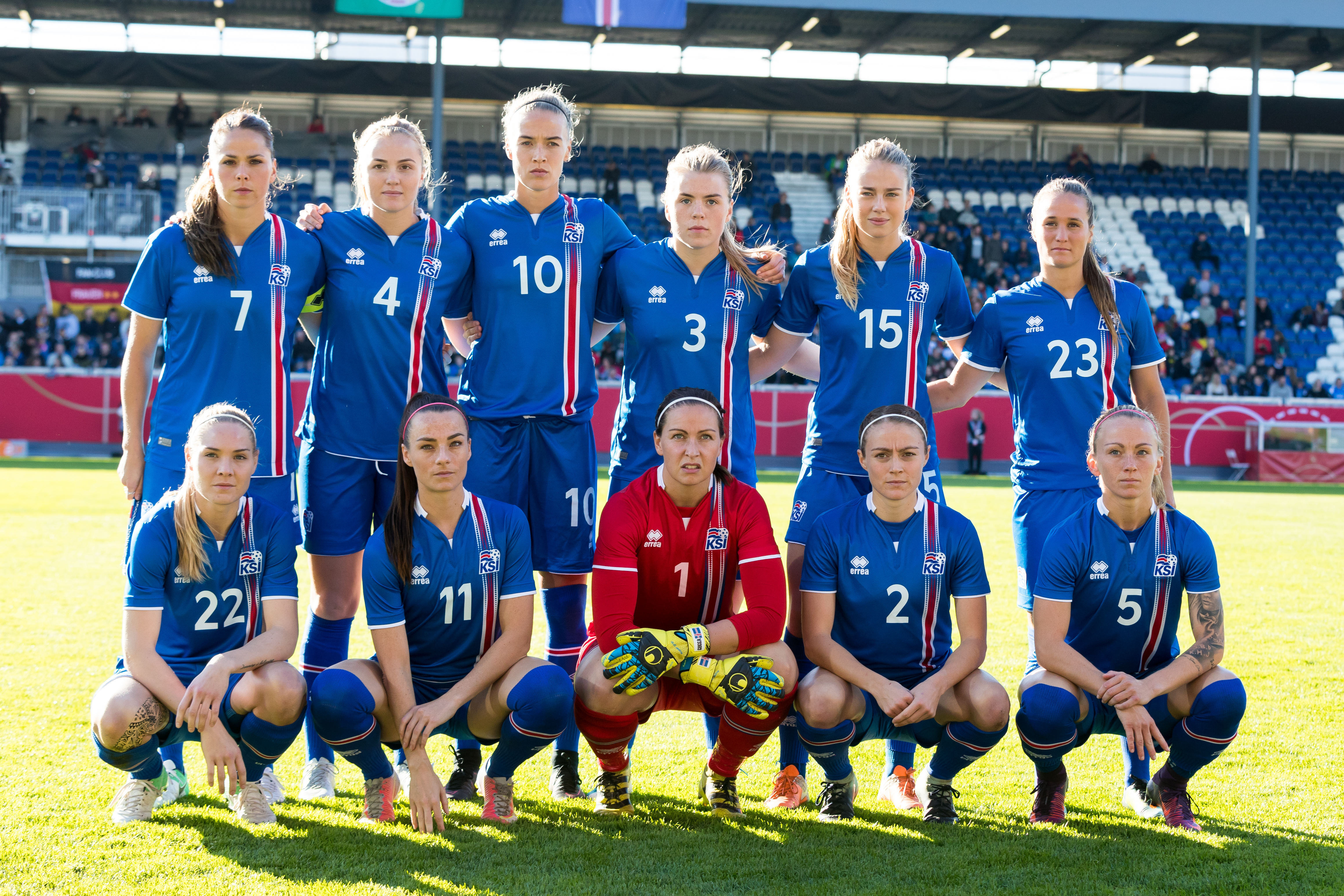 during Fussball Frauen Deutschland vs Island at Brita-Arena, Wiesbaden, Hessen, Germany on 2017-10-20, Photo: Sven Mandel